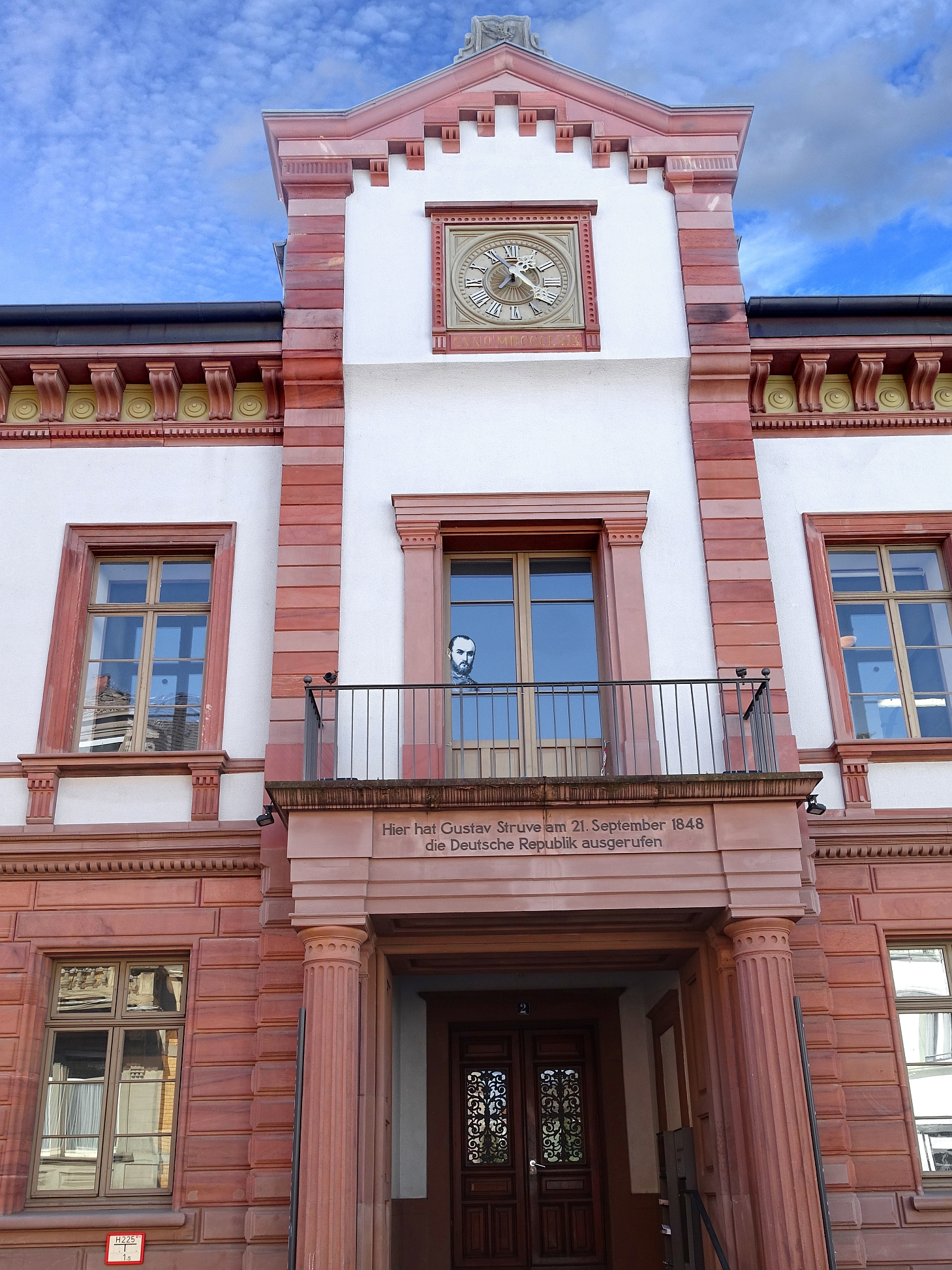 Gustav Struve (1805–1870), Rechtsanwalt und Publizist im Großherzogtum Baden. Als radikaldemokratischer Politiker in der Märzrevolution trat er für ein föderativ-republikanisches Staatswesen im Sinne der Großdeutschen Lösung ein. Inschrift über dem Eingang: Hier hat Gustav Struve am 21. September 1848 die Deutsche Republik ausgerufen. Standort. Altes Rathaus, Untere Wallbrunnstr. 2, 79539 Lörrach, Deutschland